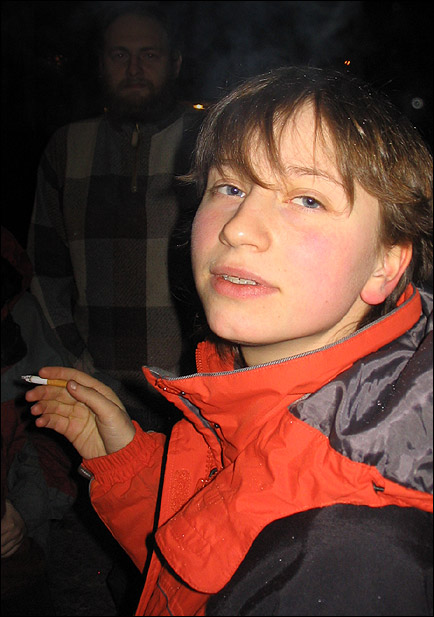 Russian poet Alina Kudryasheva (Кудряшева, Алина Кирилловна) in 2007